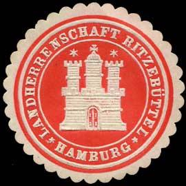 Sealing stamp Title: Landherrenschaft Ritzebüttel - Hamburg Description: rot, weiß, geprägt Place: Hamburg size: 3 cm